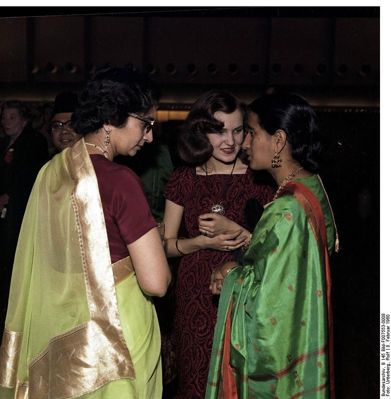 Empfang der indischen Botschaft in der Beethovenhalle